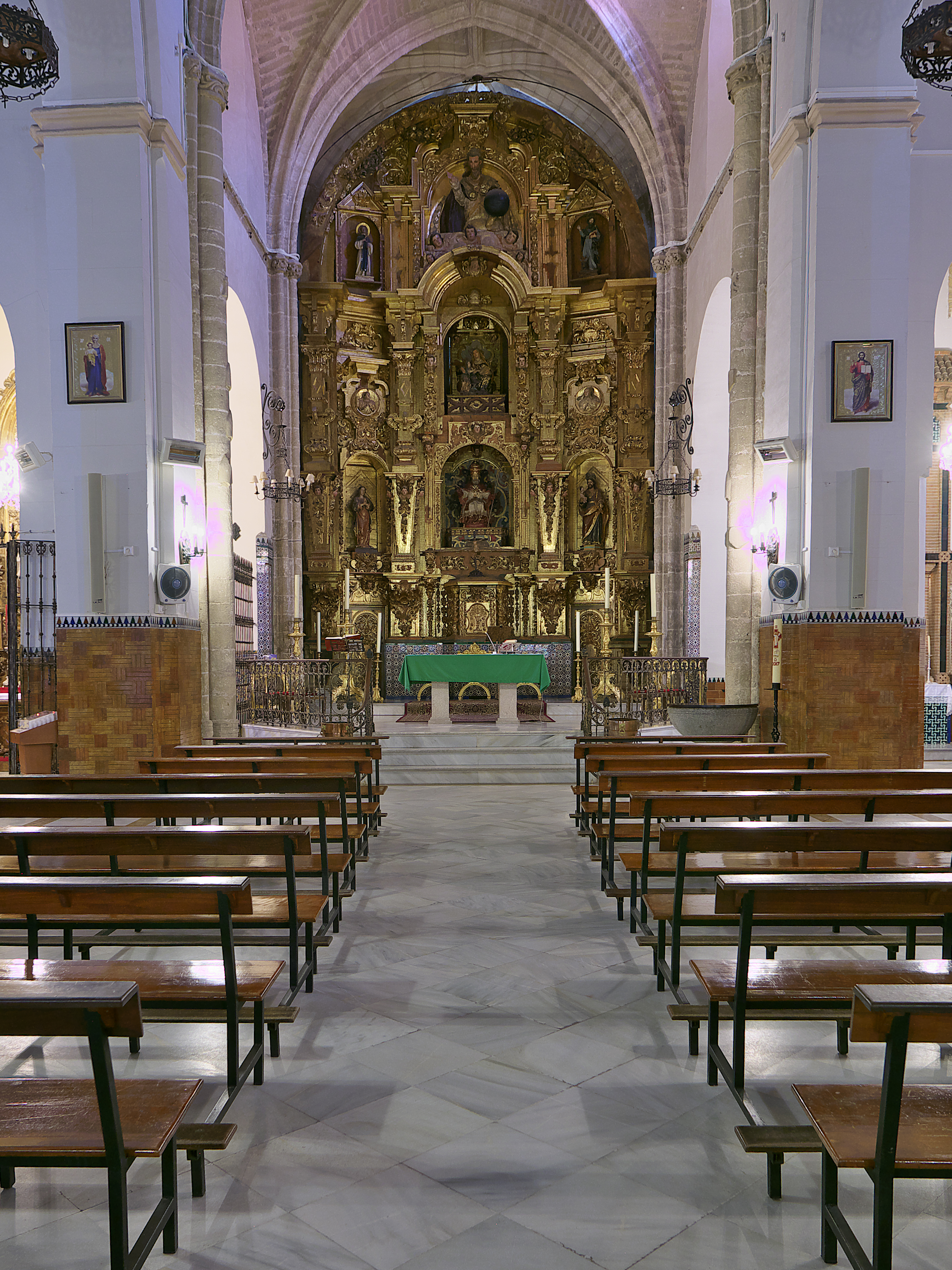 Altar mayor y retablo de Antonio de Carvajal (1772).